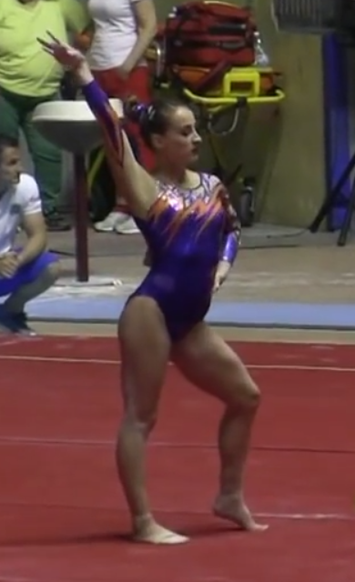 Esercizio a corpo libero di Carlotta Ferlito nella prima giornata (Concorso Generale) dei Campionati Nazionali Assoluti di Ginnastica Artistica a Torino il 9 Luglio 2016 [screenshot from video at 0:15]